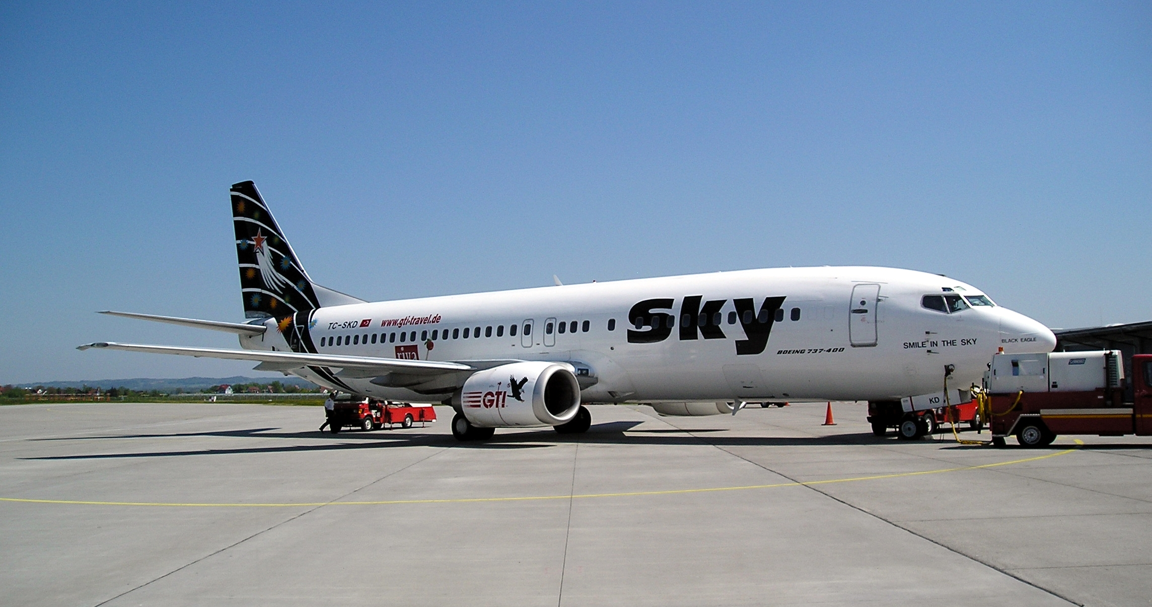 Sky Airlines Boeing 737-400 (TC-SKD), Friedrichshafen Airport (Germany)